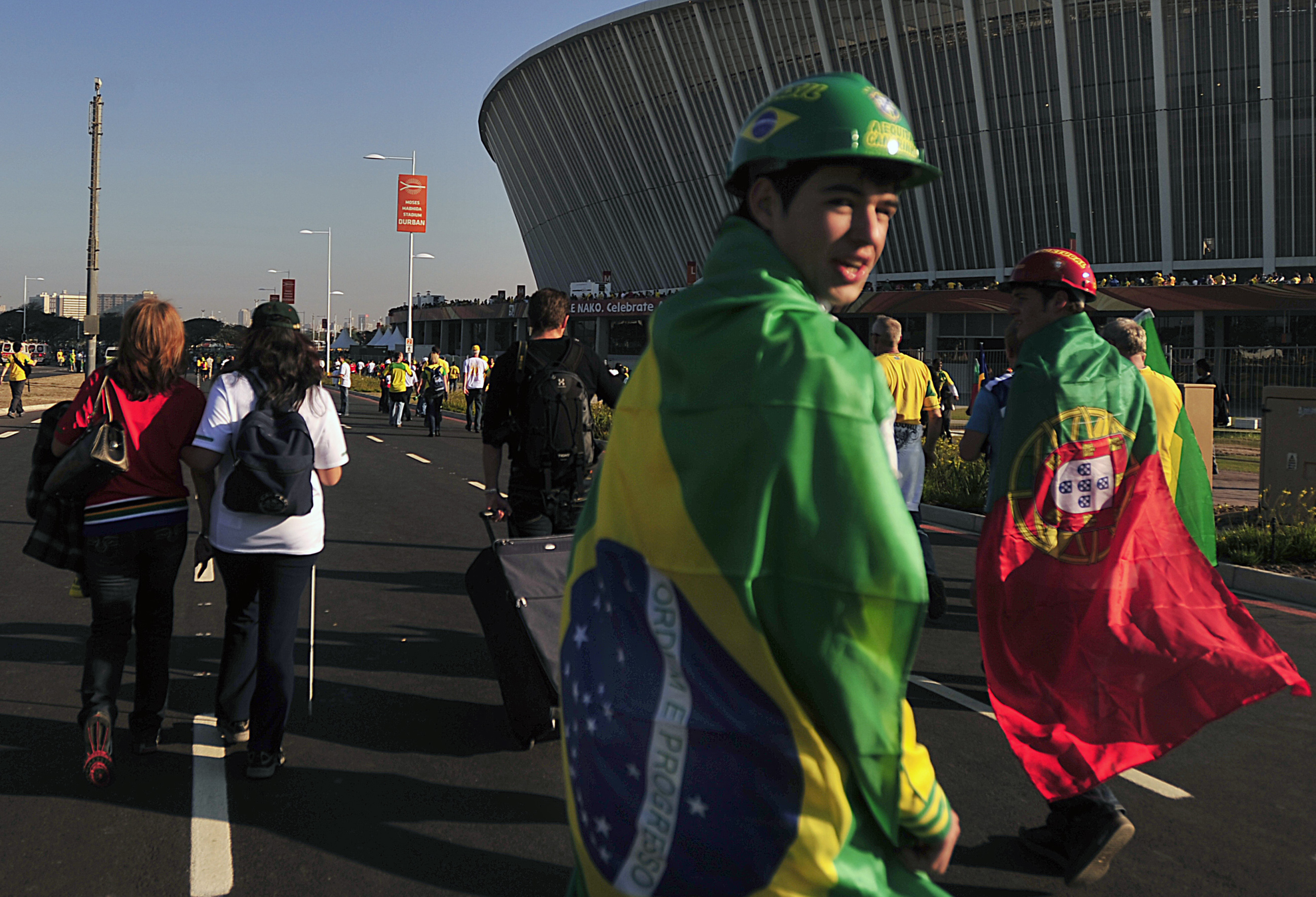 Durban (África do Sul) - As cores do Brasil e de Portugal se misturaram do lado do estádio Moses Mabhida.